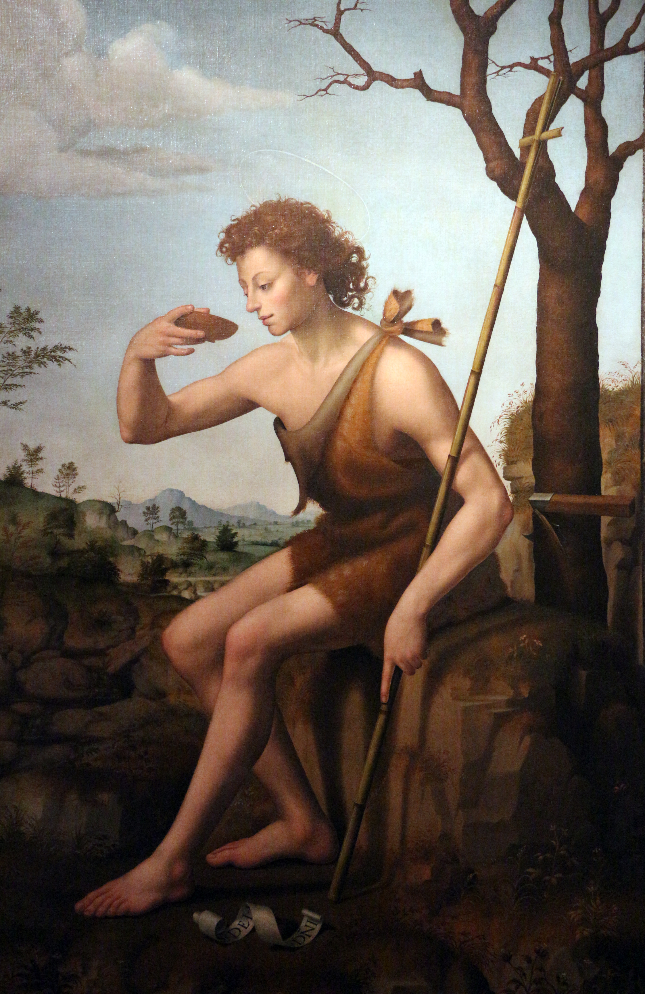 Pinacoteca Nazionale di Bologna This is a photo of a monument which is part of cultural heritage of Italy.